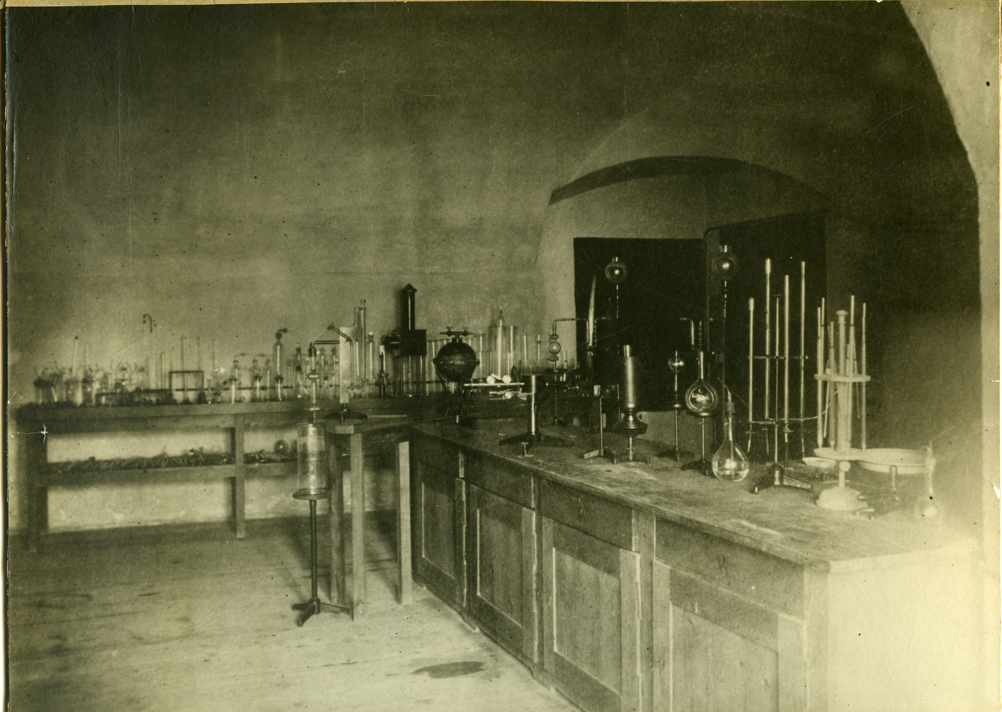 Labor in der ehemaligen Schlossküche des Schlosses Hohentübingen